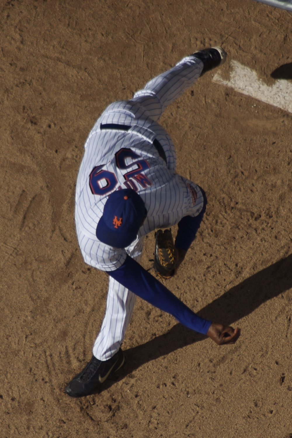 Guillermo Mota